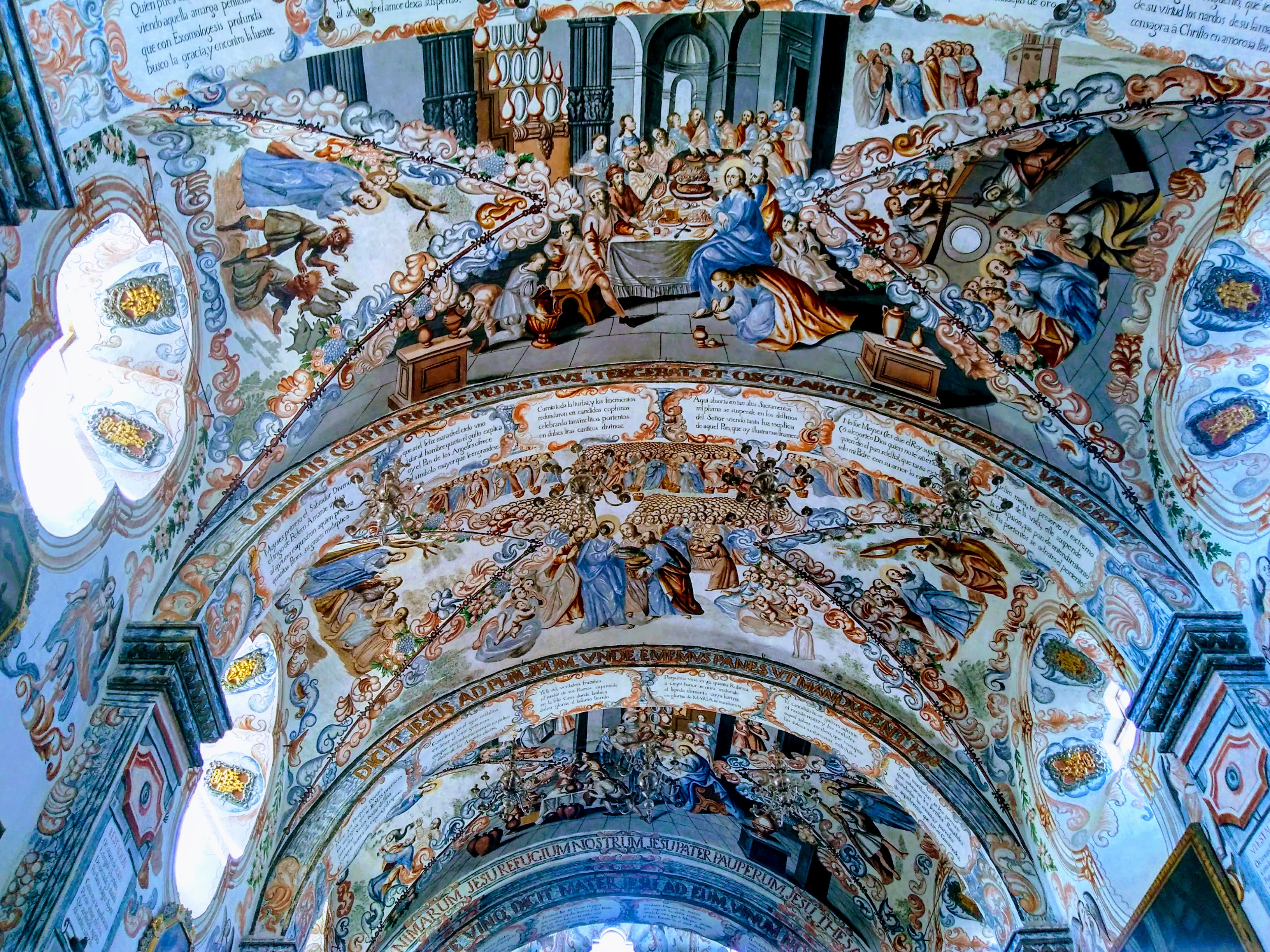 Santuario de Jesús Nazareno de Atotonilco2